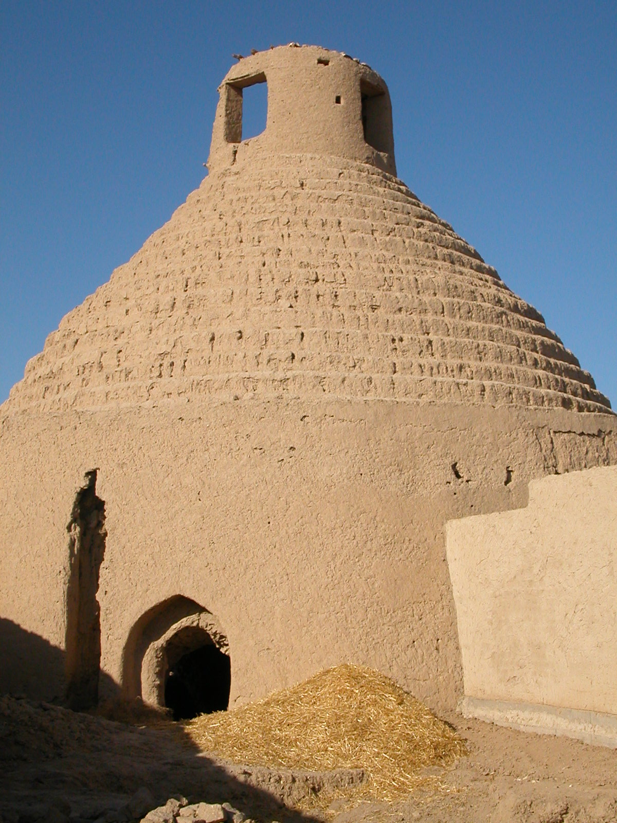 تپه شمس‌آباد